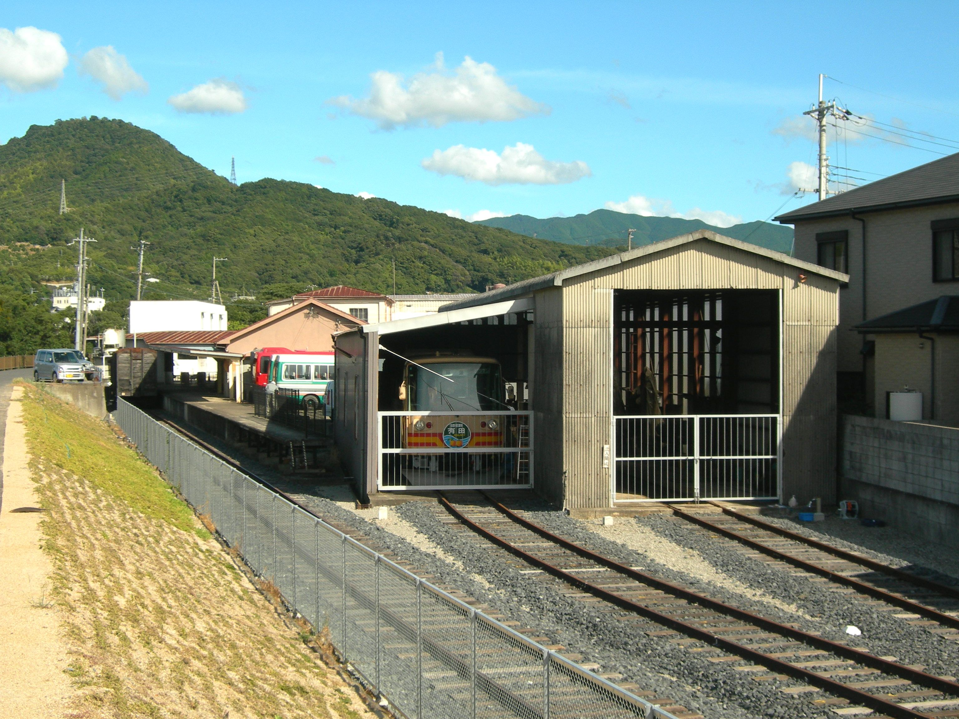 有田鉄道 金屋口駅構内跡